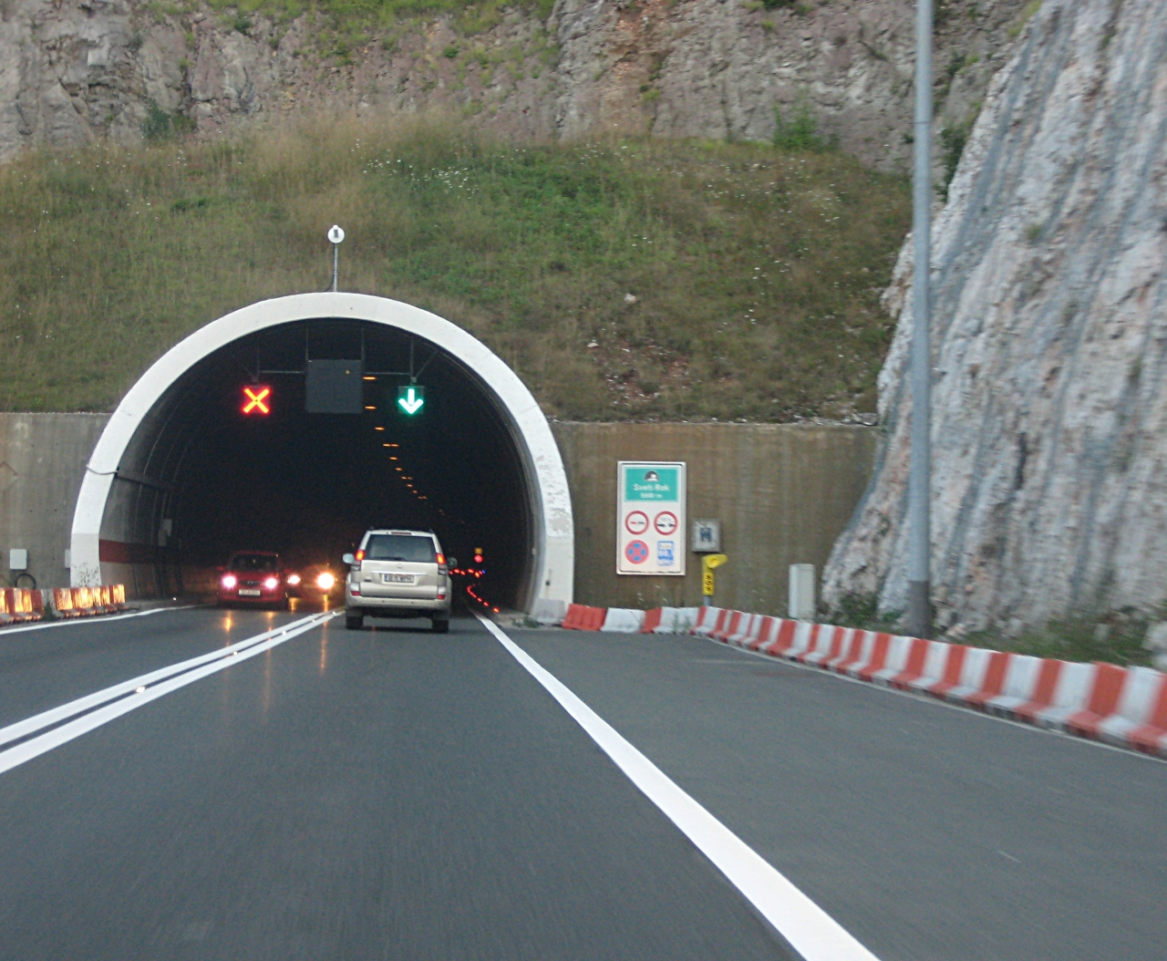 Tunel Sv. Rok, Autocesta_A1.